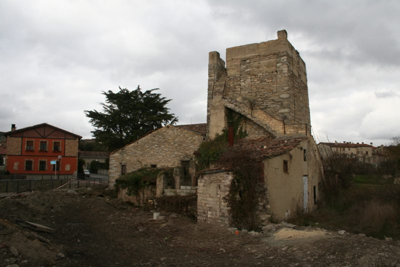 Torre de calcinación de Nanclares de la Oca (Álava) antes de su restauración